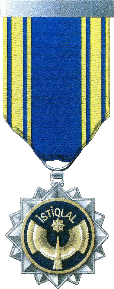 İstiqlal- ordeni